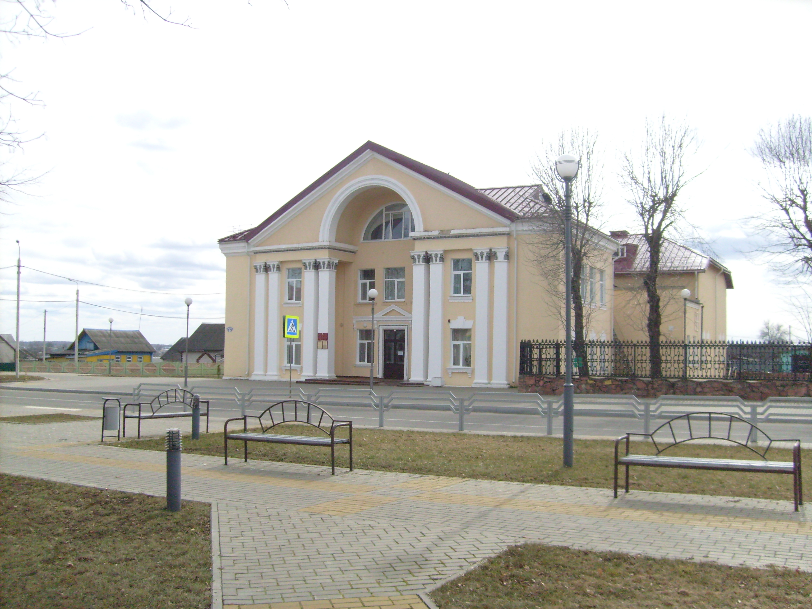 Дом культуры в Горках